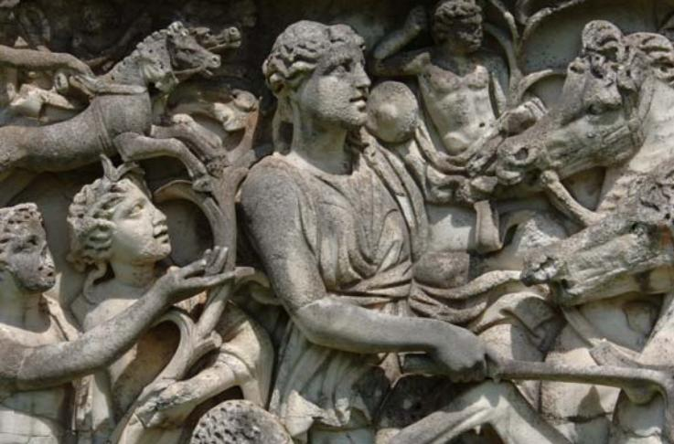 Sarcofago di Endimione (particolare) Cliveden